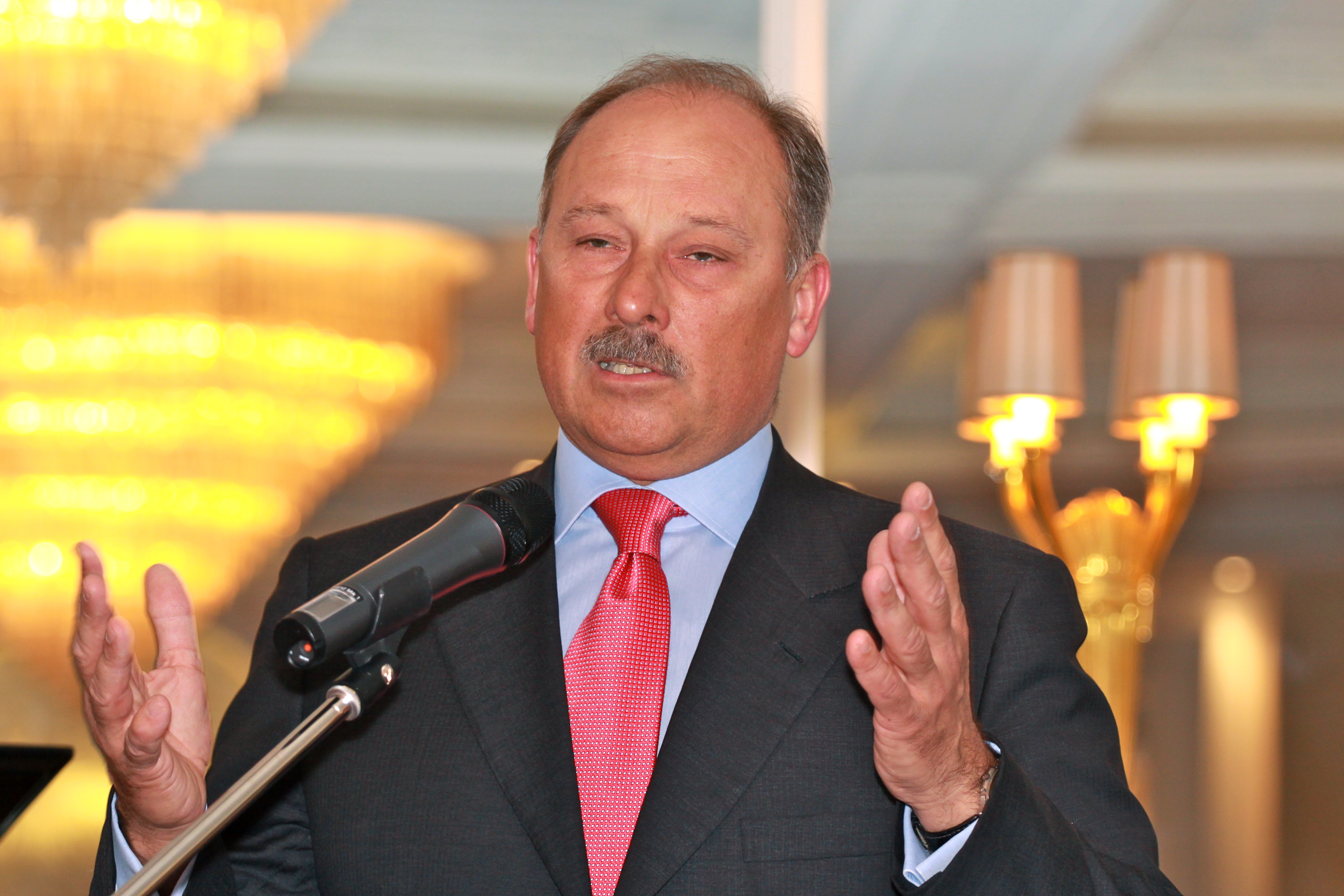 Sie dürfen das Foto mit Nennung des Autors honorarfrei vervielfältigen, verbreiten und öffentlich zugänglich machen. Foto: Jürg Vollmer / Infos